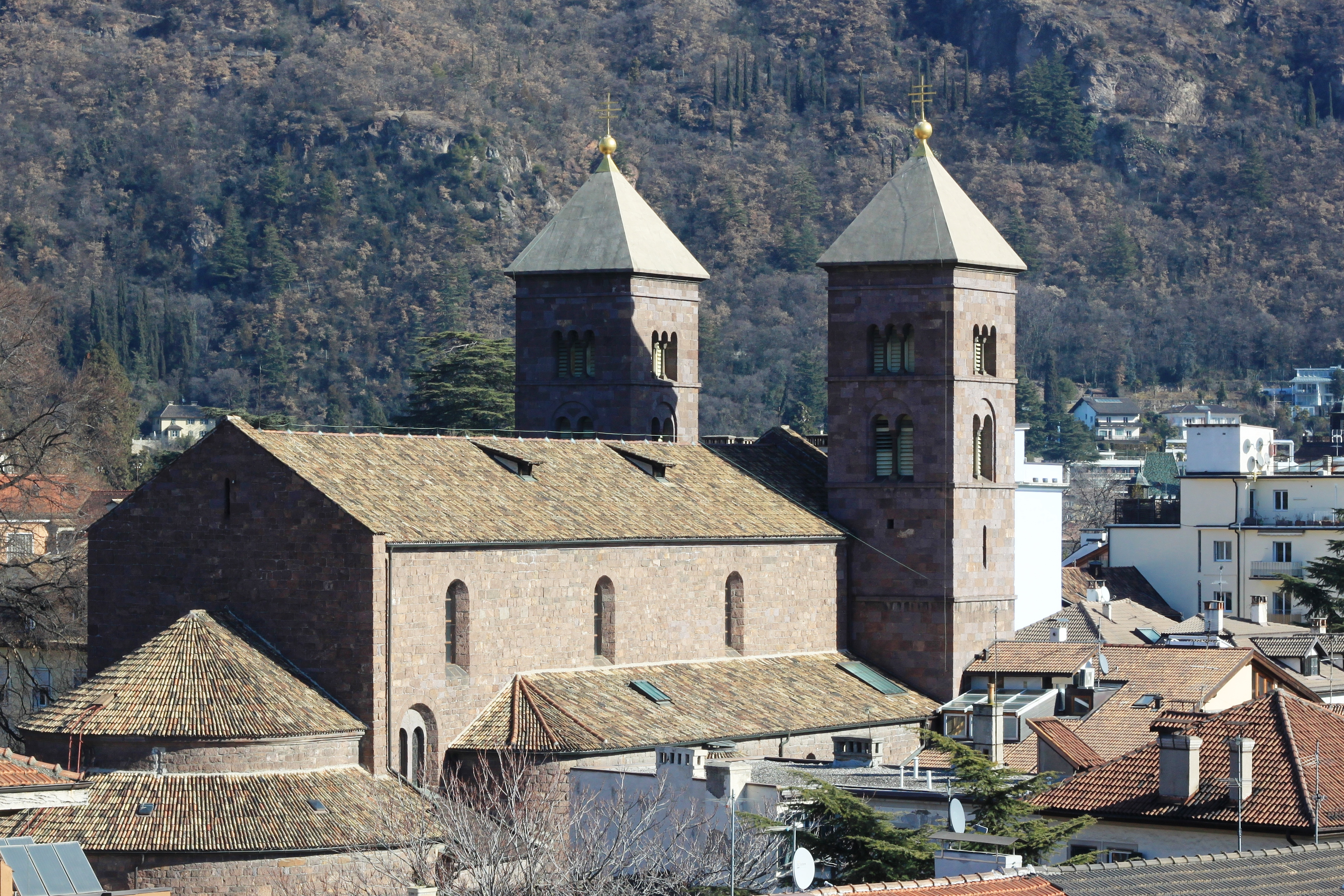 Herz-Jesu-Kirche in Bozen (Südwestansicht)